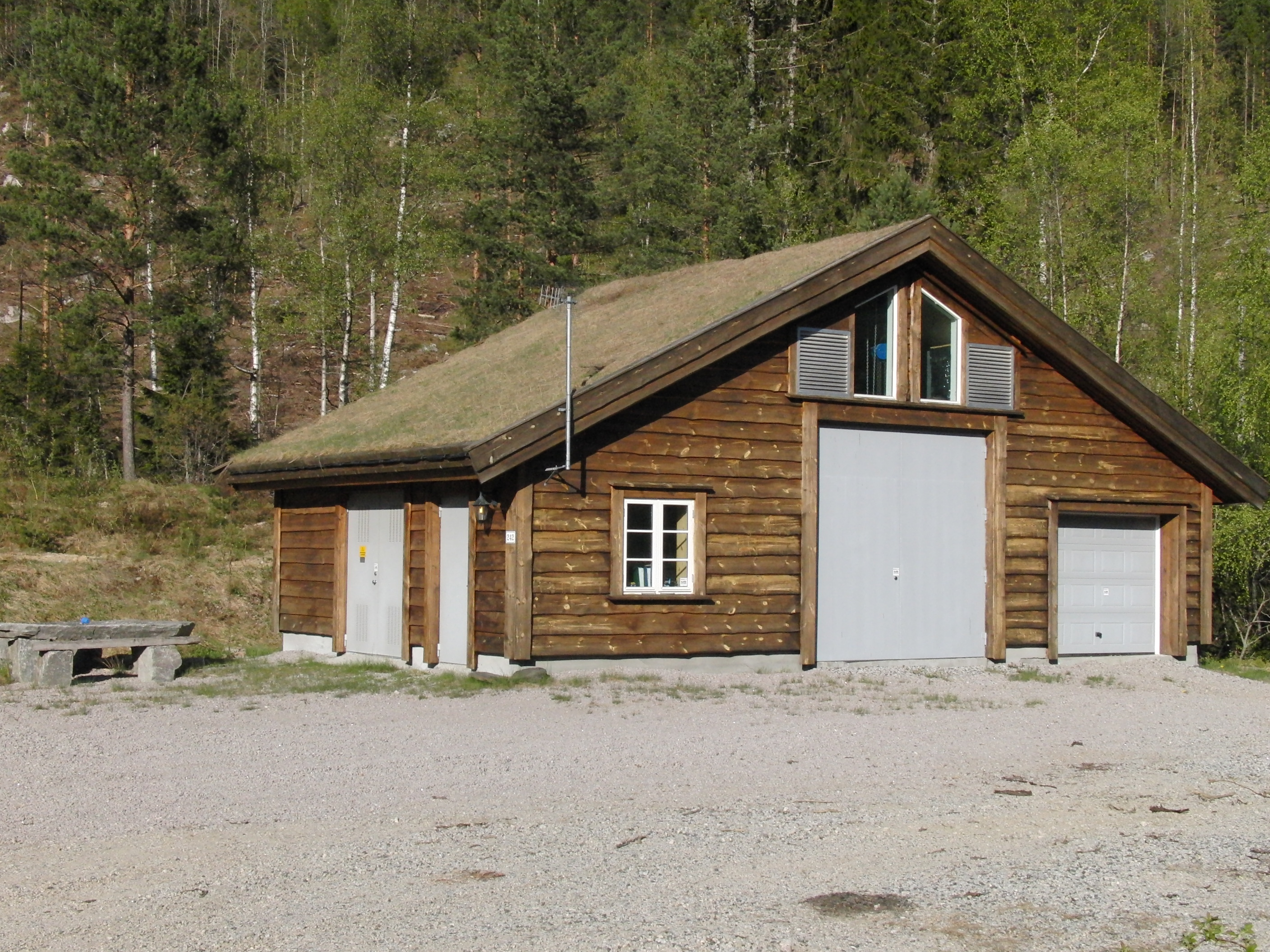 Nasvatn kraftverk